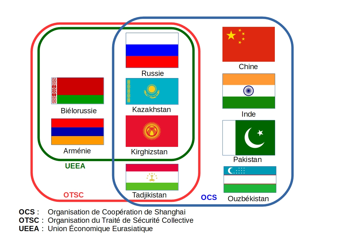 Schéma des principales alliances inter étatiques dans l'espace eurasiatique - mai 2018